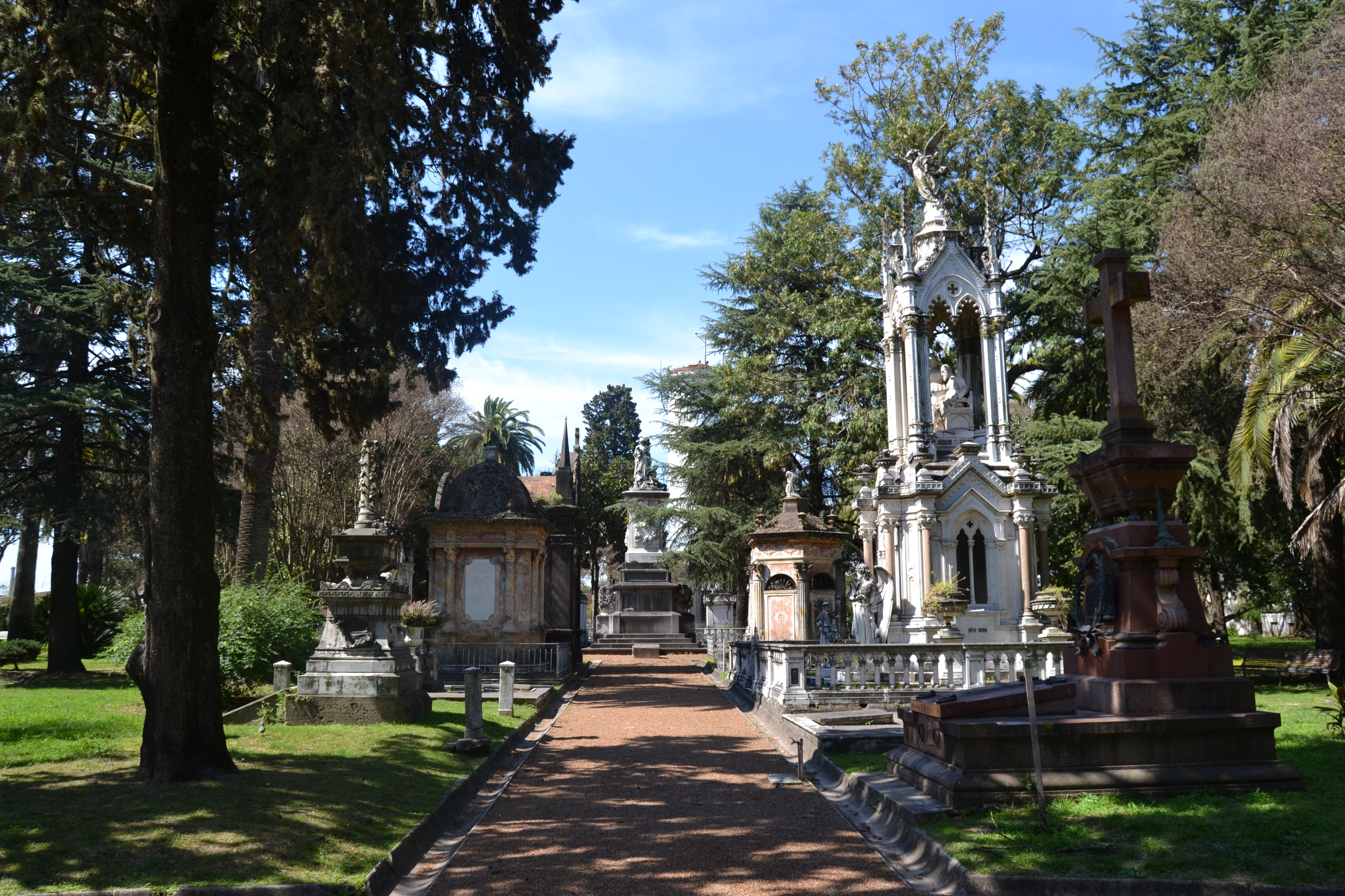 Monumento a Perpetuidad o Cementerio Viejo (varias esculturas) Mon. Hist. Nacional. Ubicada en el departamento de Paysandú